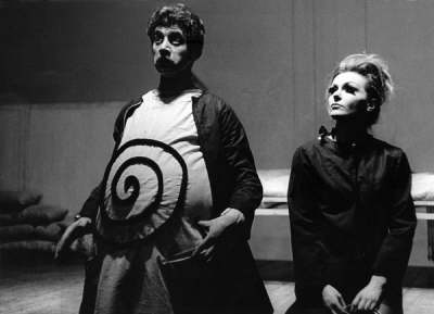 Marilú Marini y Jorge Fiszon en Ubu Rey de Alfred Jarry Instituto di Tella Buenos Aires 1968